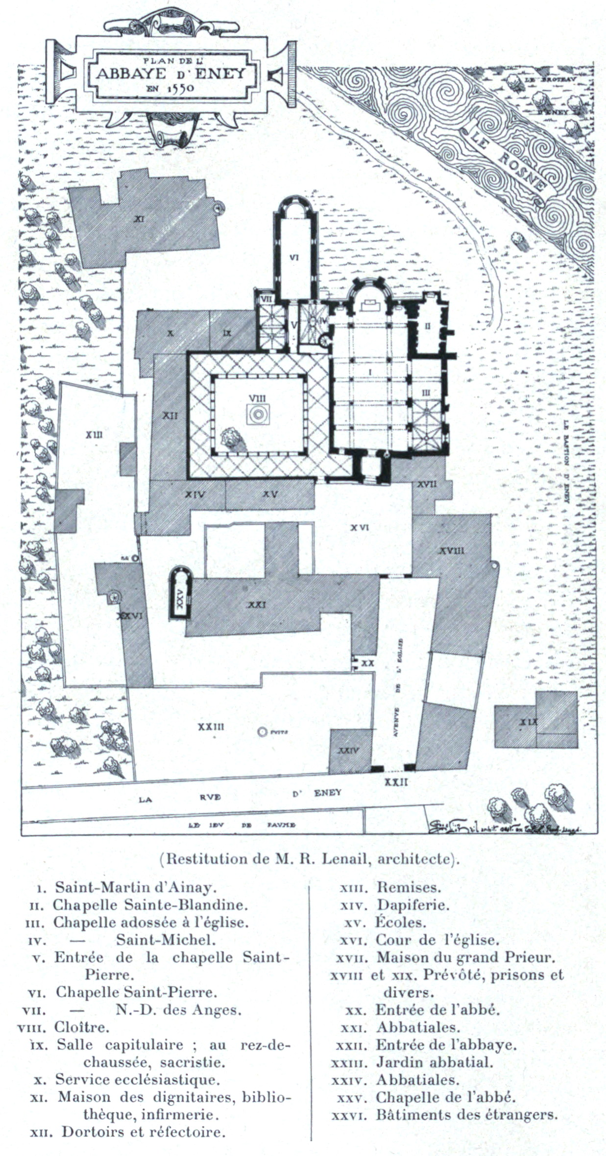 Illustration pour l'Histoire des églises et chapelles de Lyon